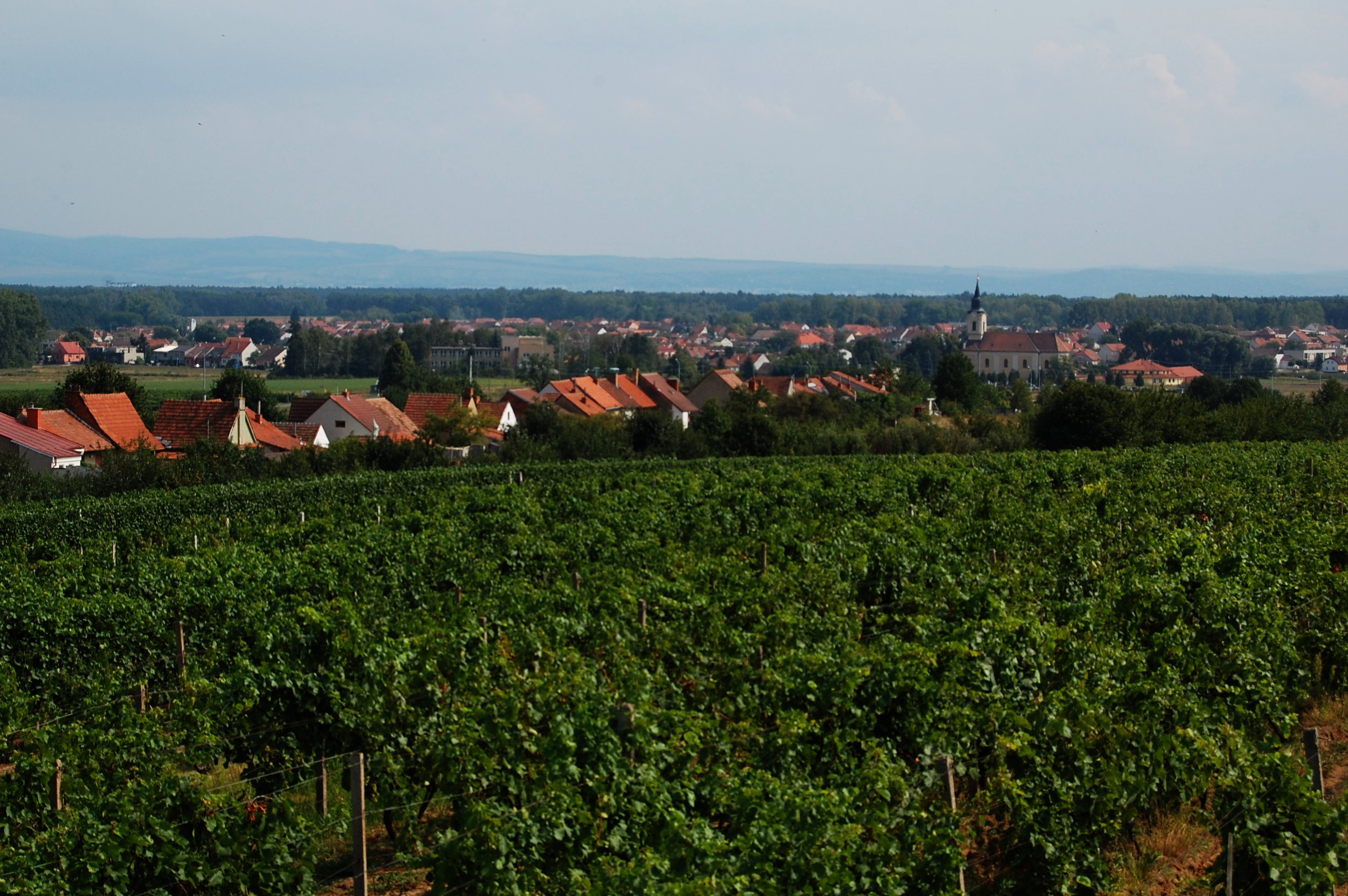 Část obce Ratíškovice focená z posedu nad vinnými sklepy Slavín